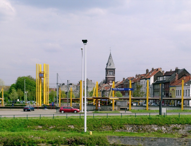 station Ruisbroek, Belgium